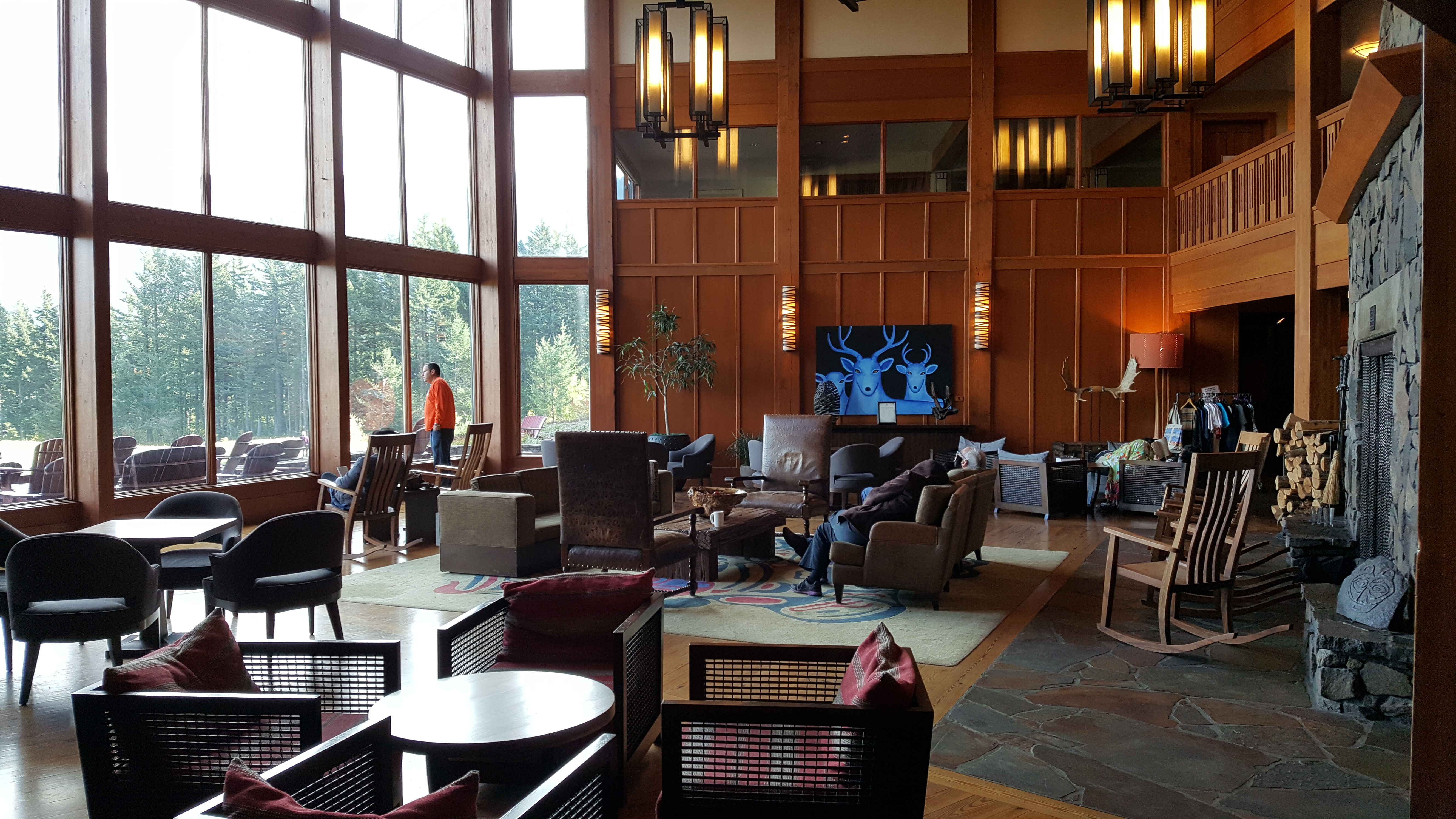 Skamania Lodge